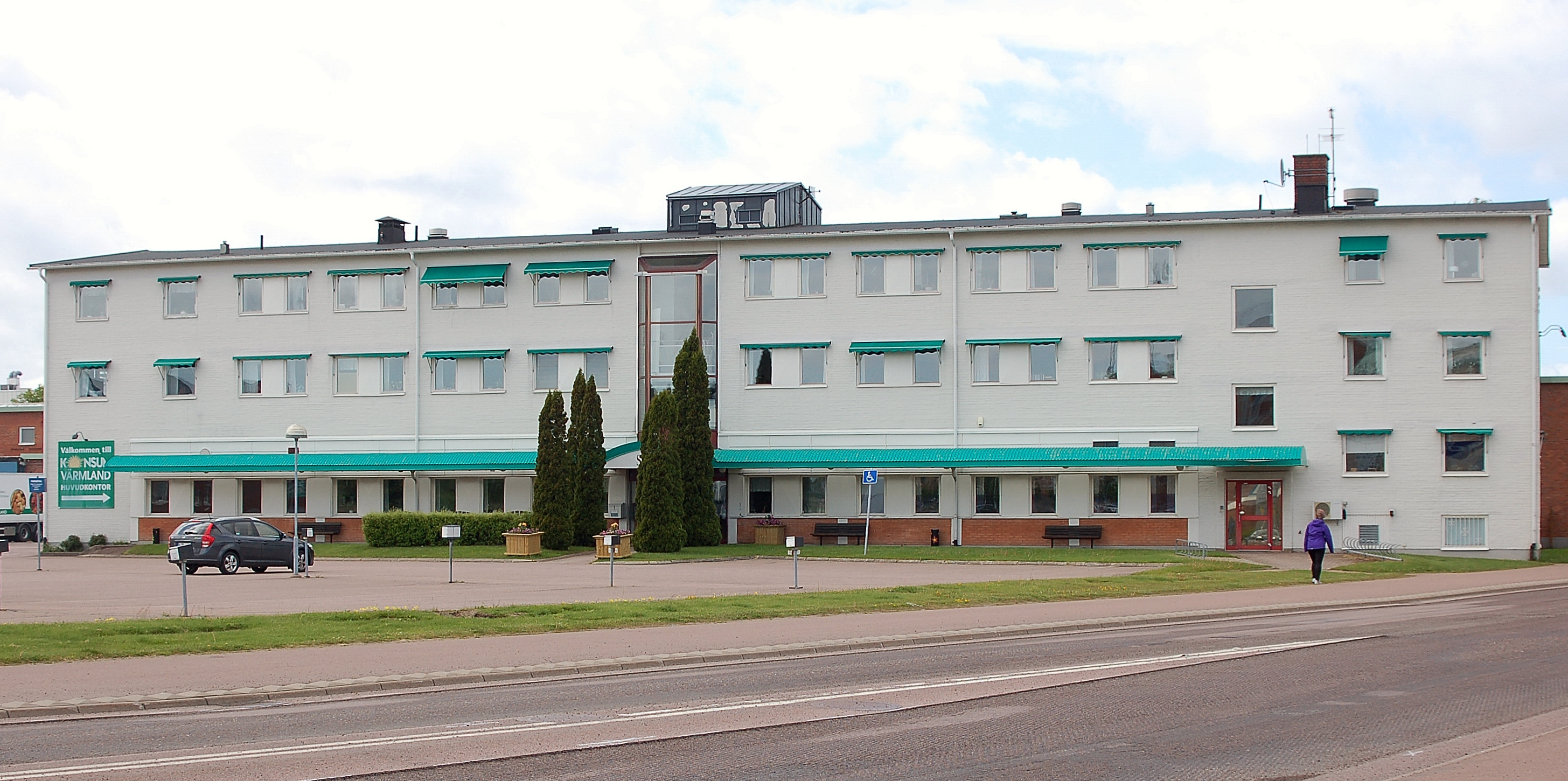 Konsum Värmlands huvudkontor i Viken, Karlstad.